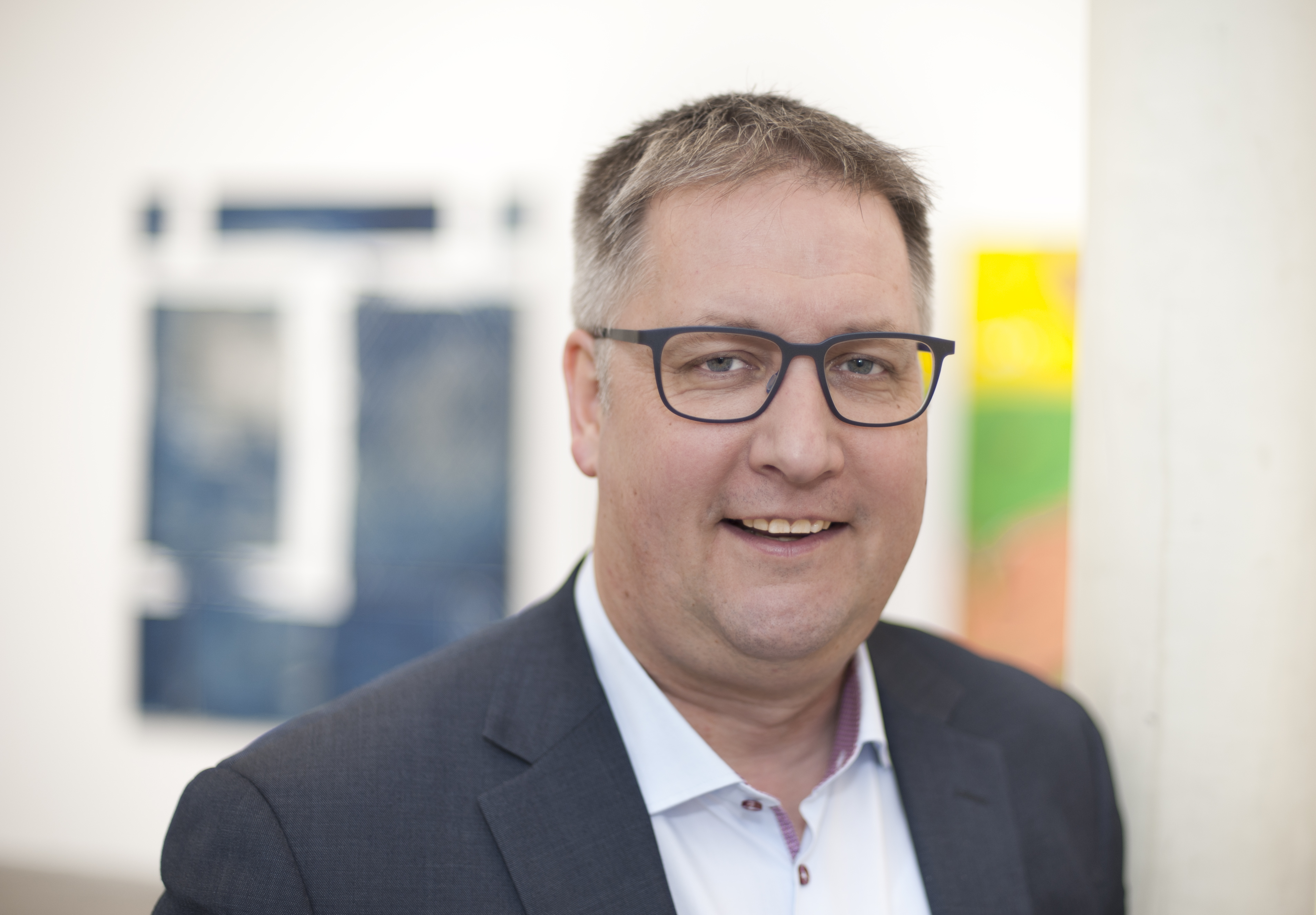 Porträtaufnahme von Prof. Dr. Holger Simon